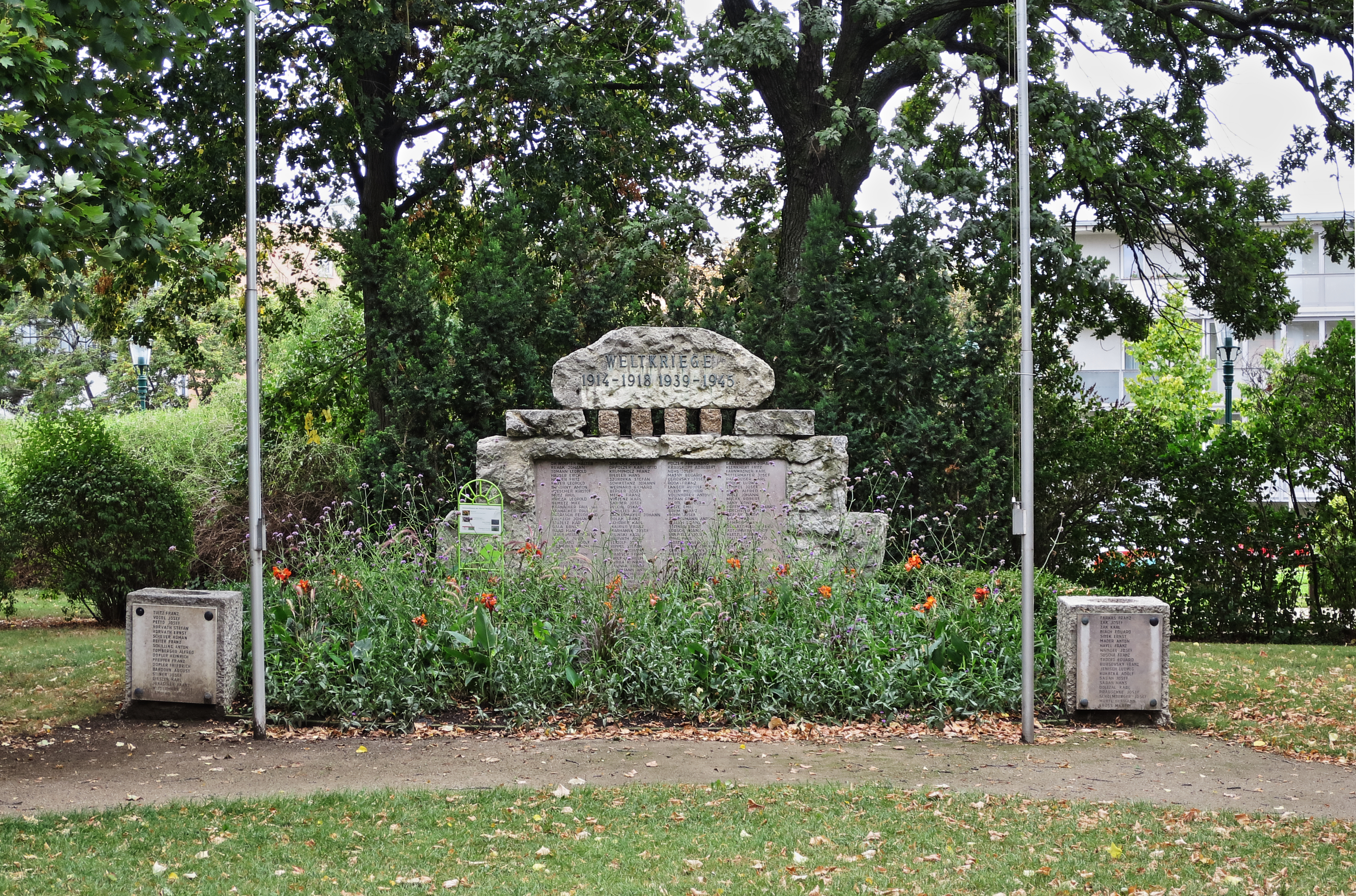 Jazzpark Essling in Wien-Donaustadt, Kriegerdenkmal